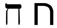 hebrew letter het